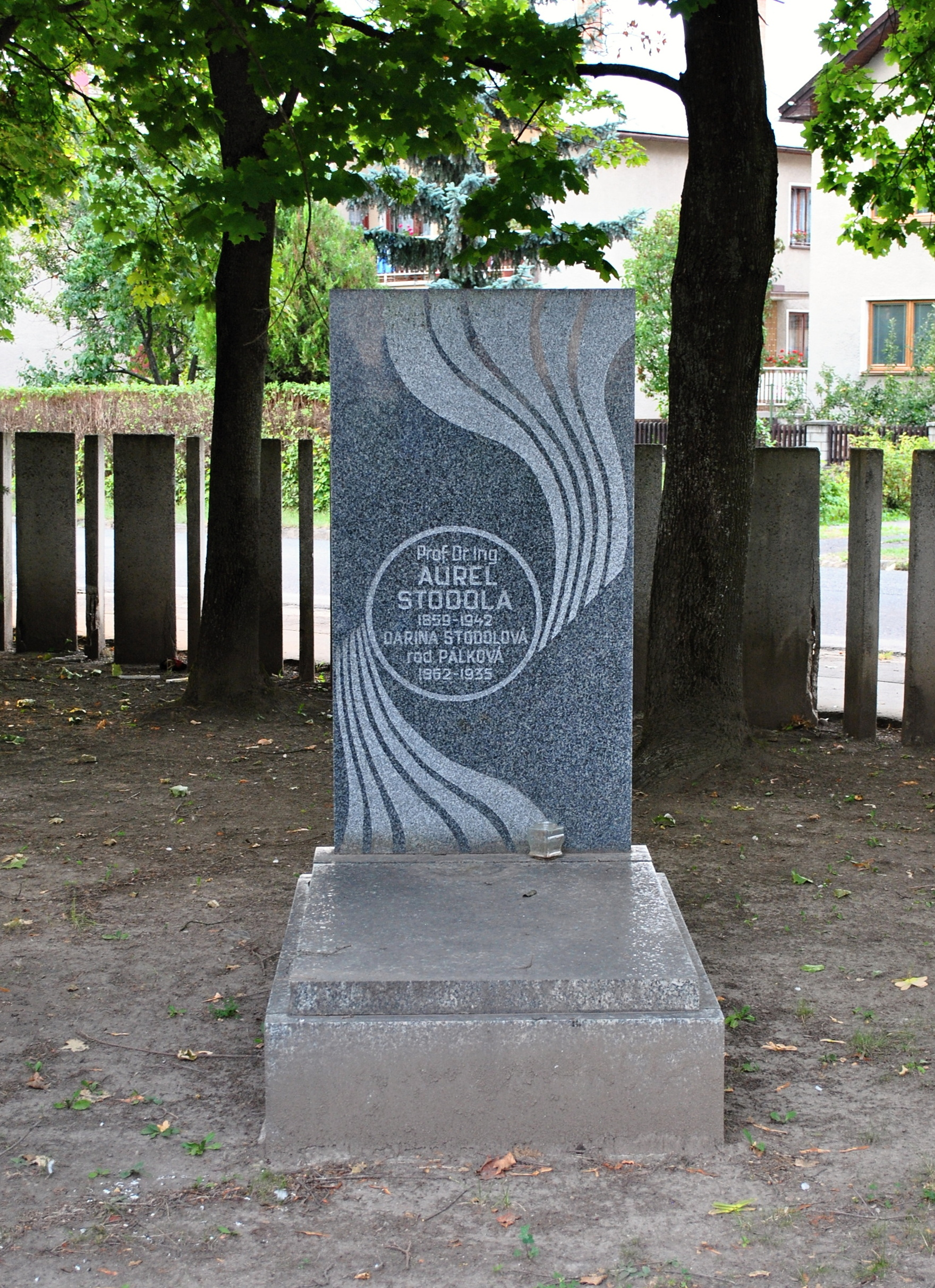 Liptovský Mikuláš - náhrobok Aurela Stodolu na vrbickom cintoríne